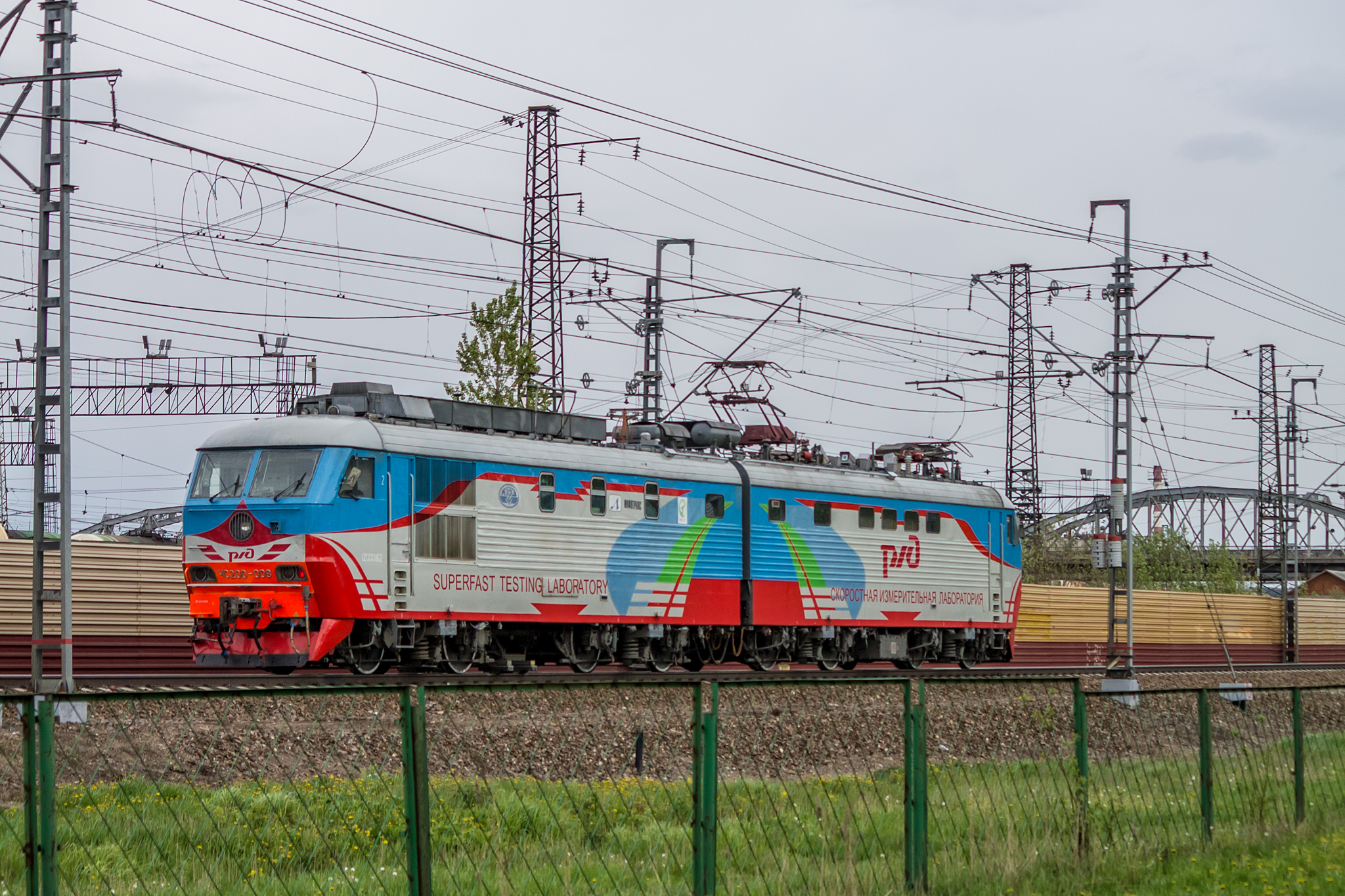 ЧС200-008, Пост 5 км - Обухово см. фото 693197 в альбоме автора